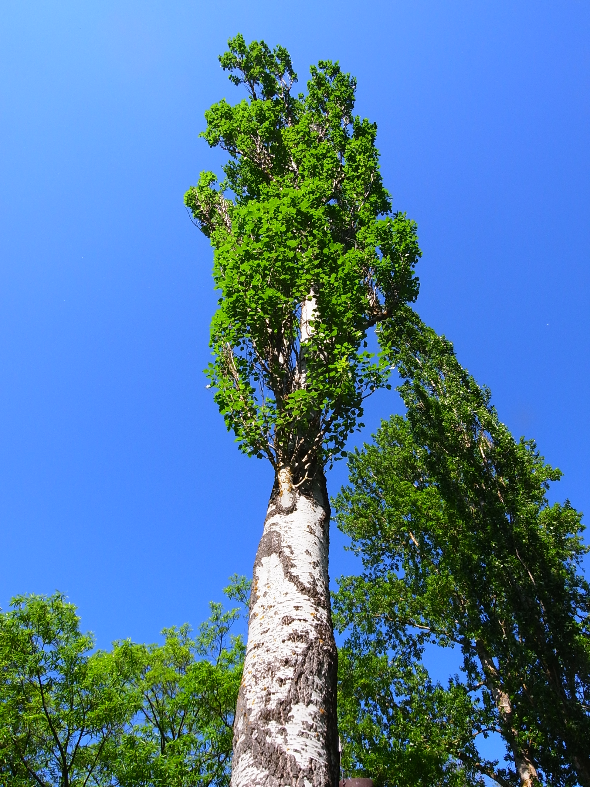 Pyramidenpappel und rechts daneben eine italienische Pappel